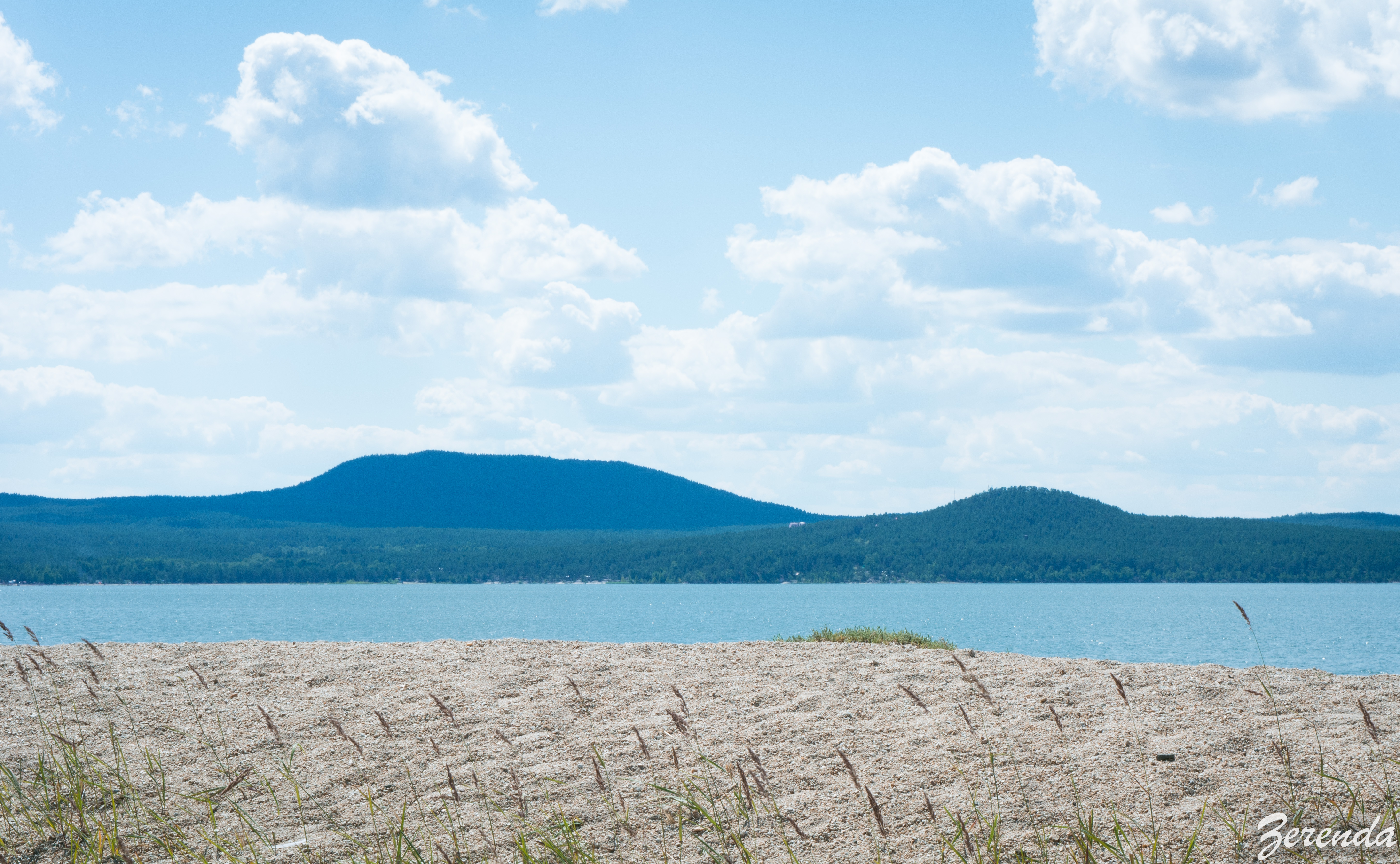 Зерендинская достопримечательность.